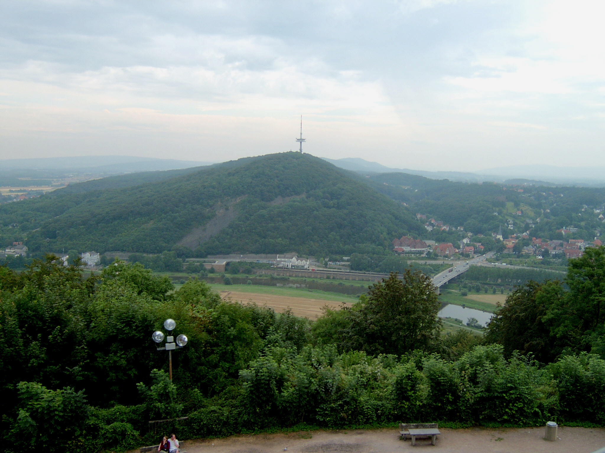 Blick zum Wesergebirge